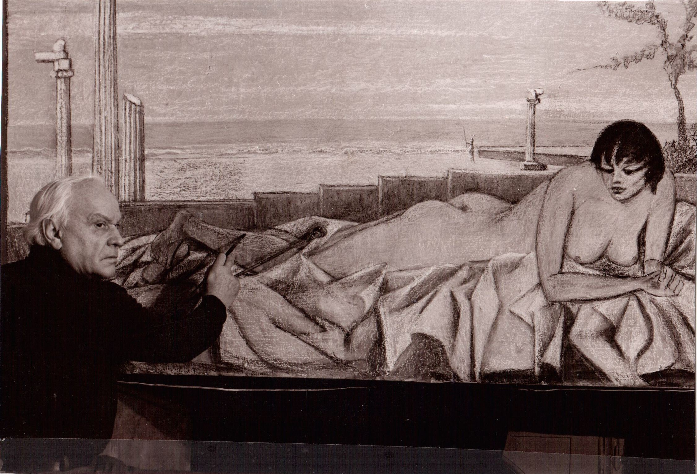 Franco Dacquati nel suo studio milanese di via Bagutta 12